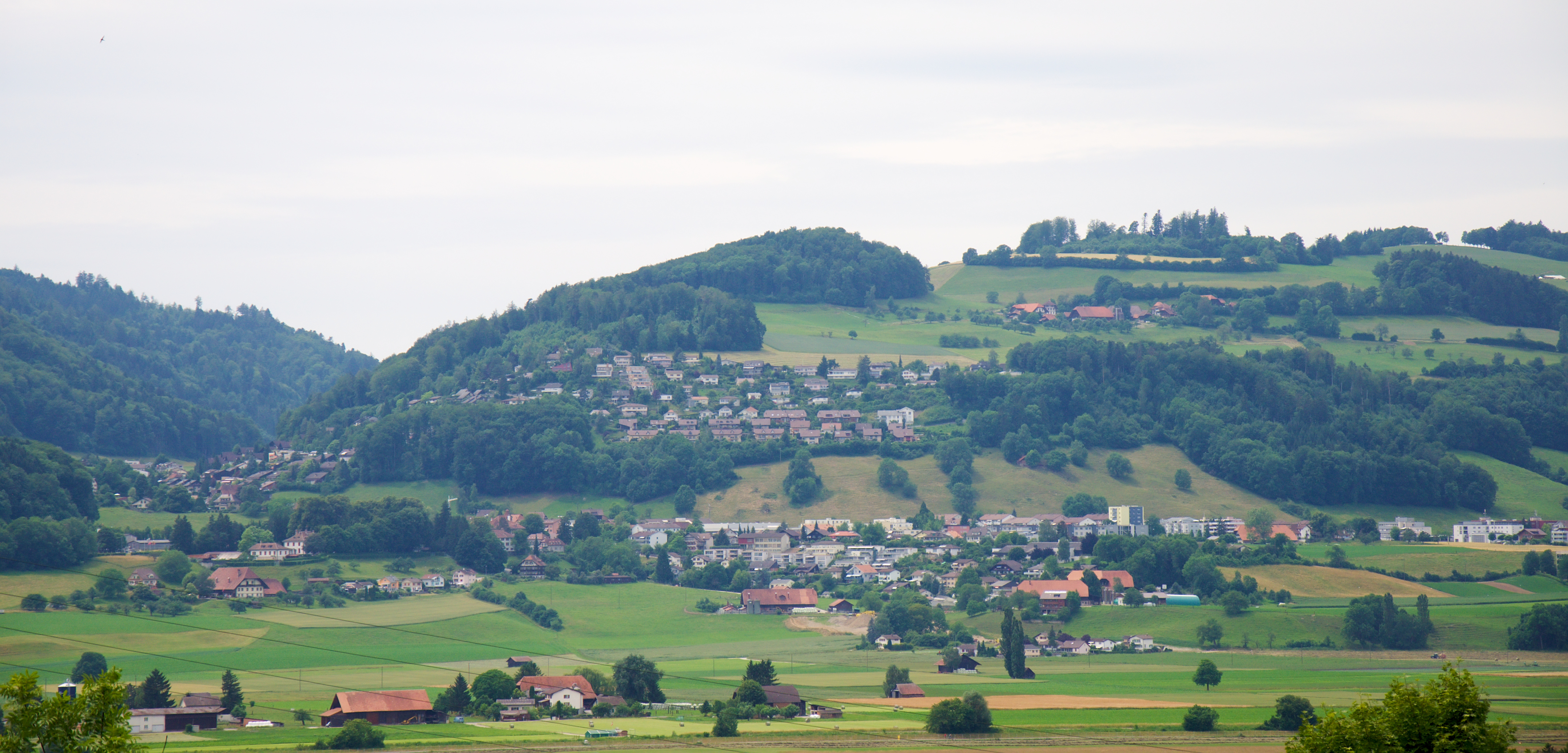 Kehrsatz